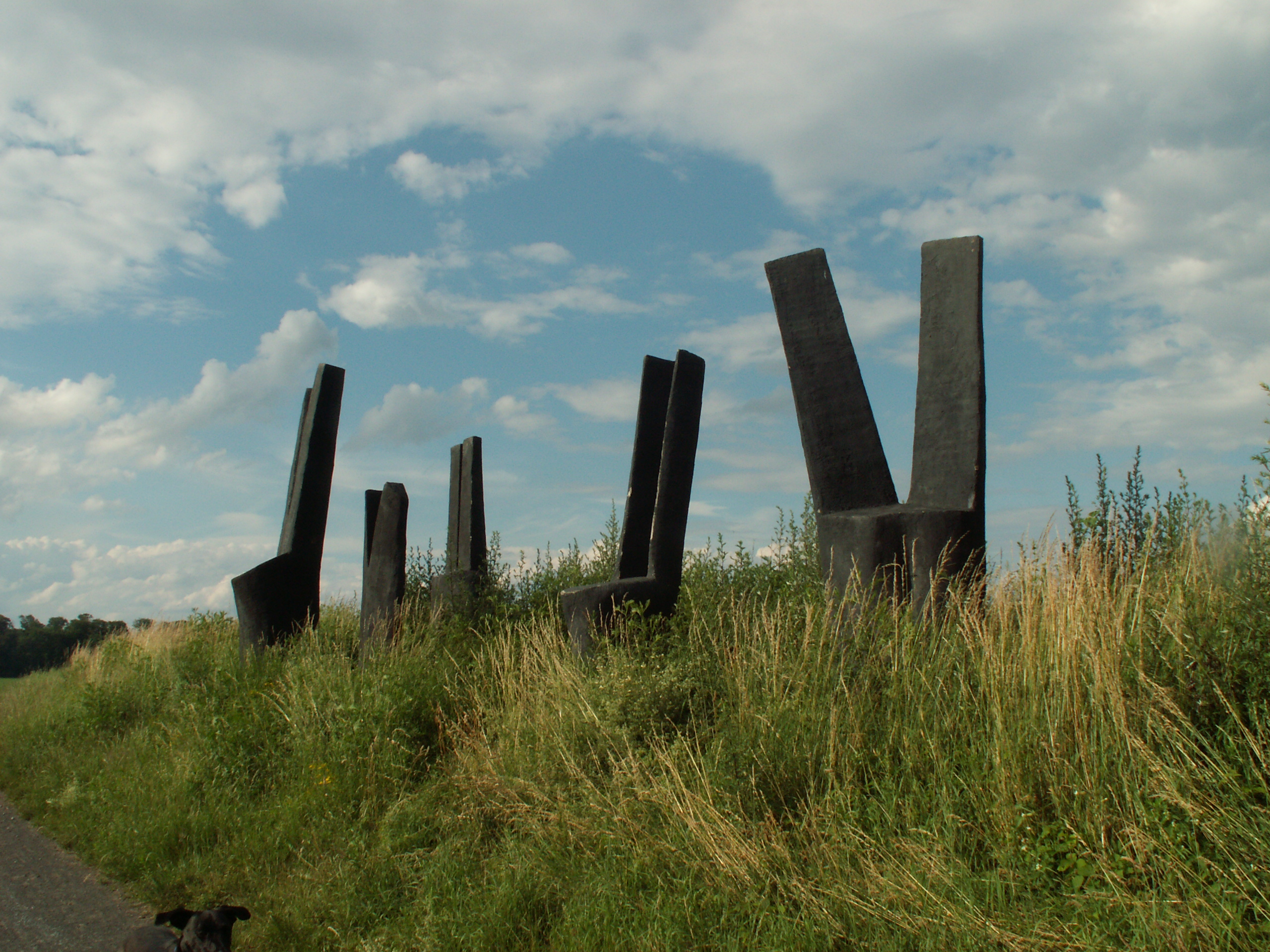 Aufgenommen auf einer Wanderung von der Darmstädter Rosenhöhe zum Steinbrücker Teich und dem Oberwaldhaus. Näheres zur Route findet sich auf der Webseite froutes Wanderung Rosenhöhe Oberwaldhaus.